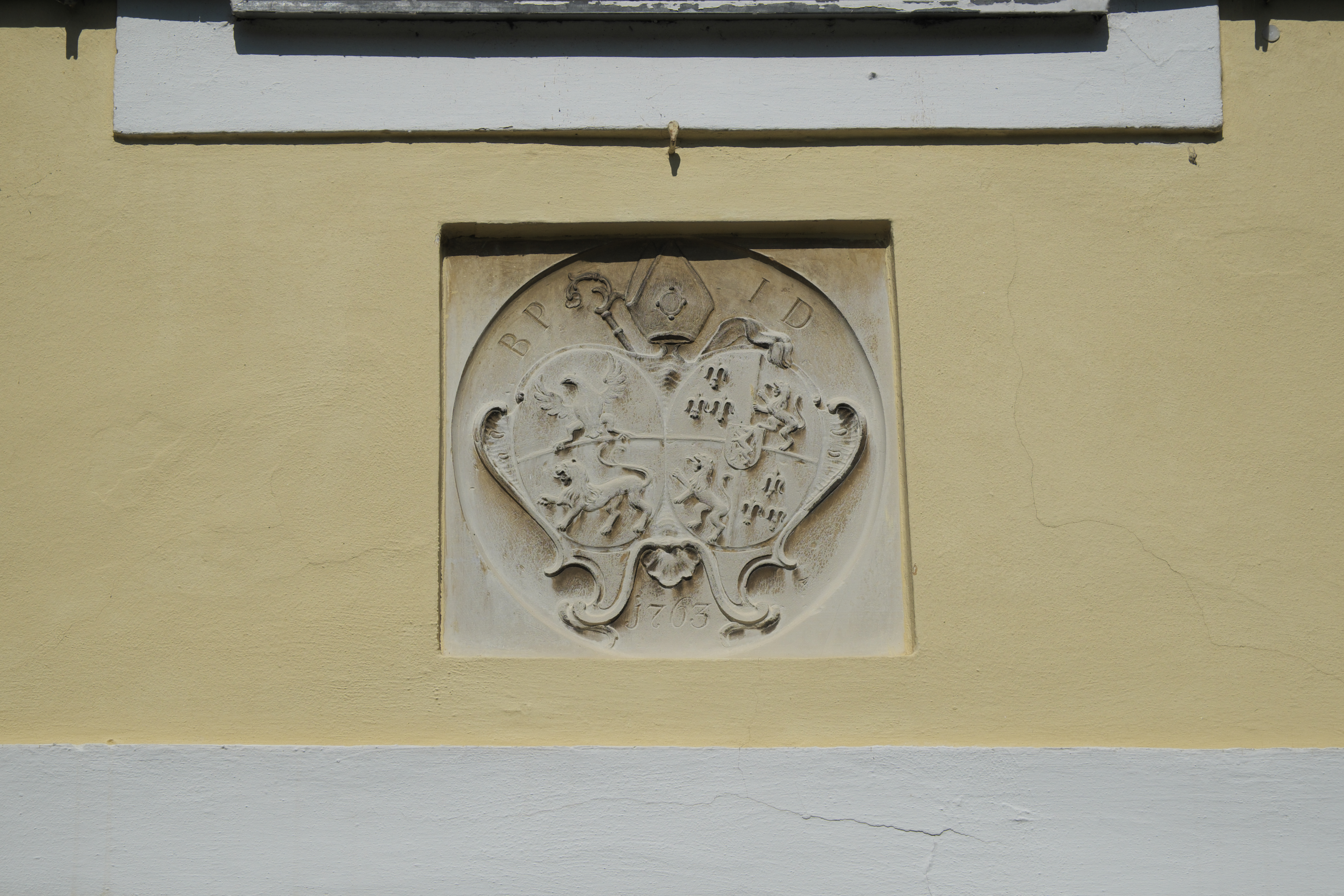 Ehemaliges Pfarrhaus in Kaufering im Landkreis Landsberg am Lech (Bayern/Deutschland), Wappen über dem Eingang